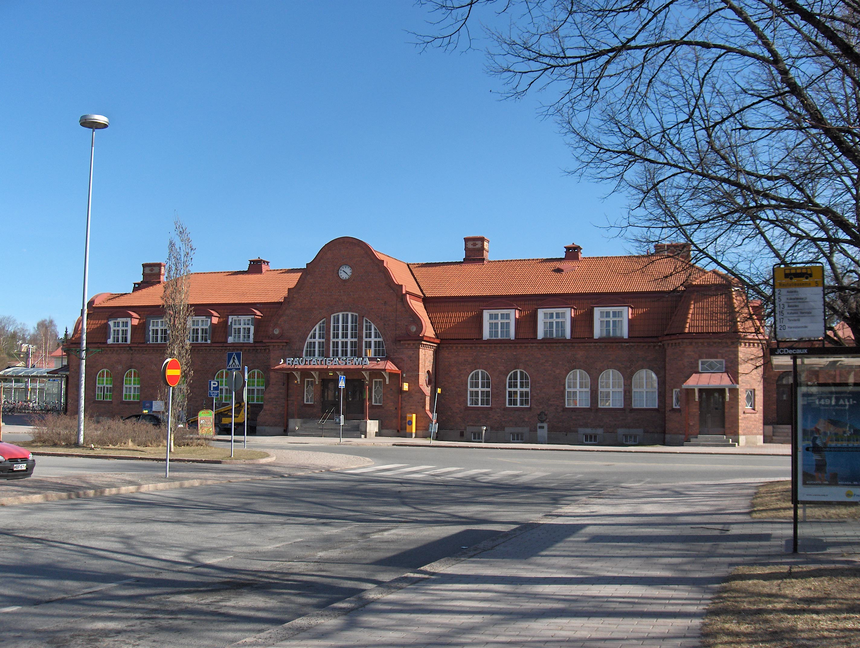 Hämeenlinnan Rautatieasema (Hämeenlinna Railway Station), Suomi / Finland